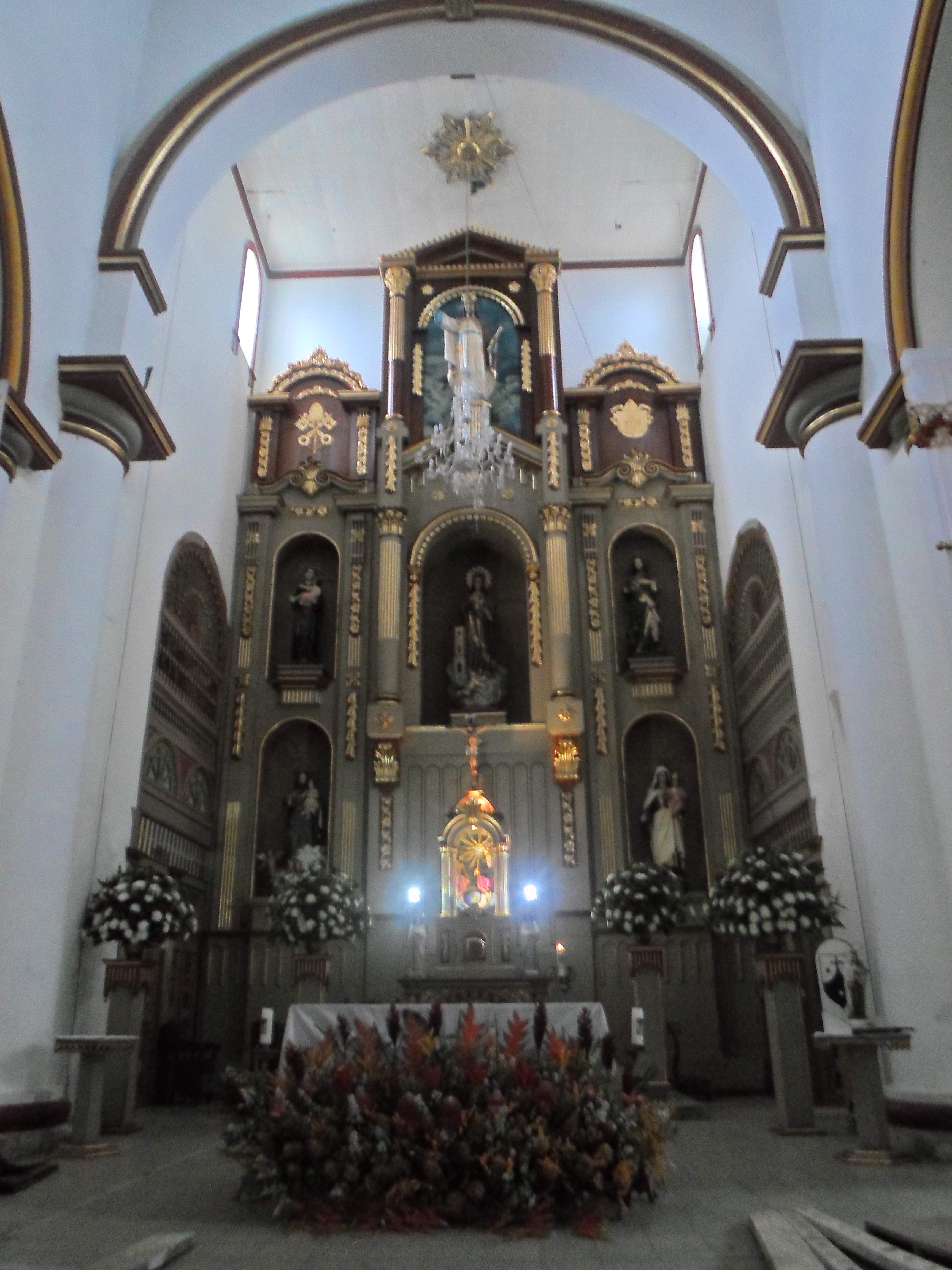 altar mayor en madera de Iglesia Santa Barbara, ituango